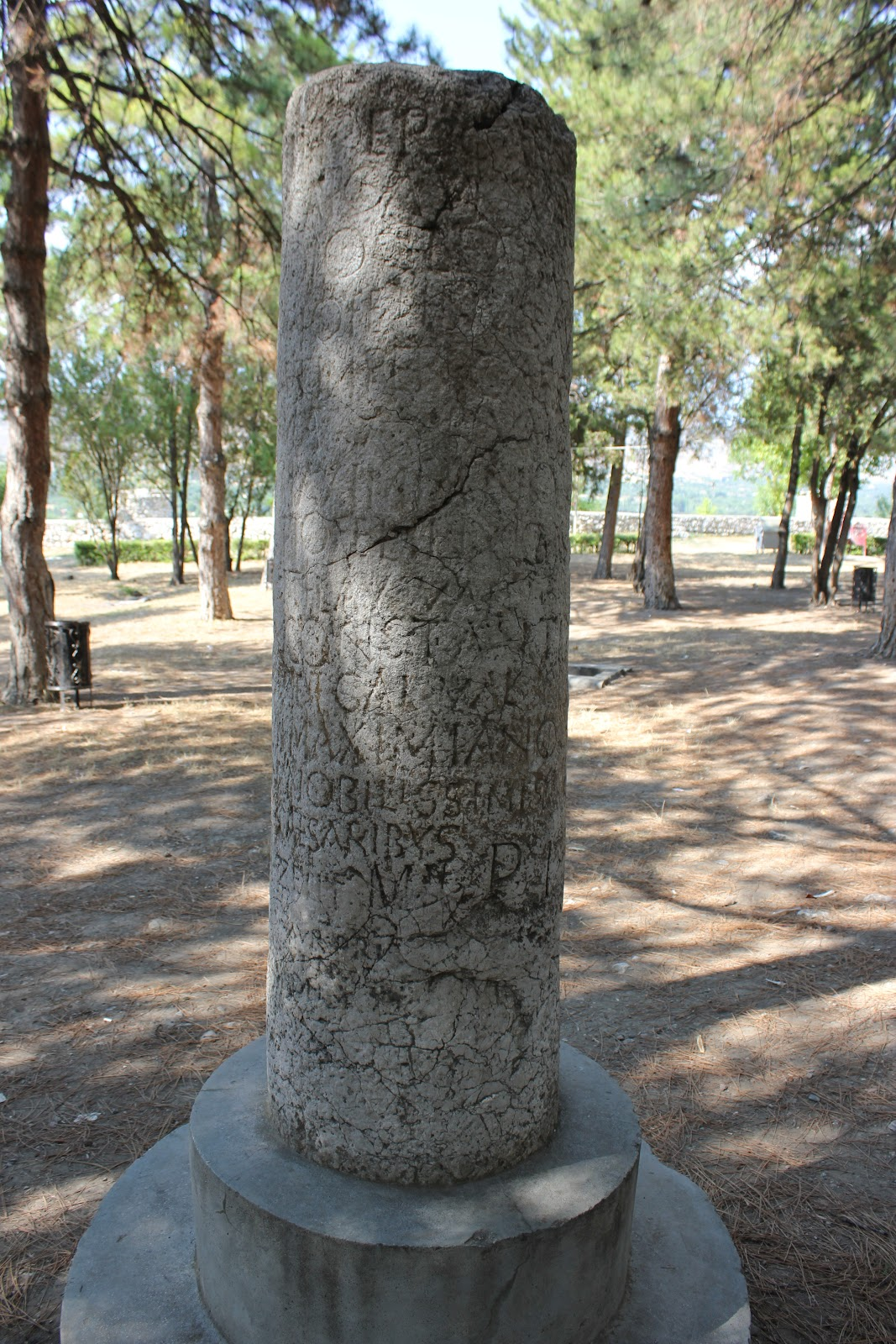 Julius Sezar'ın "Veni, vidi, vici" (Geldim, gördüm, yendim)' sözünü söylediği yer olduğu belirtilen Zile 'deki 4 bin yıllık tarihi kaleden görünüm.